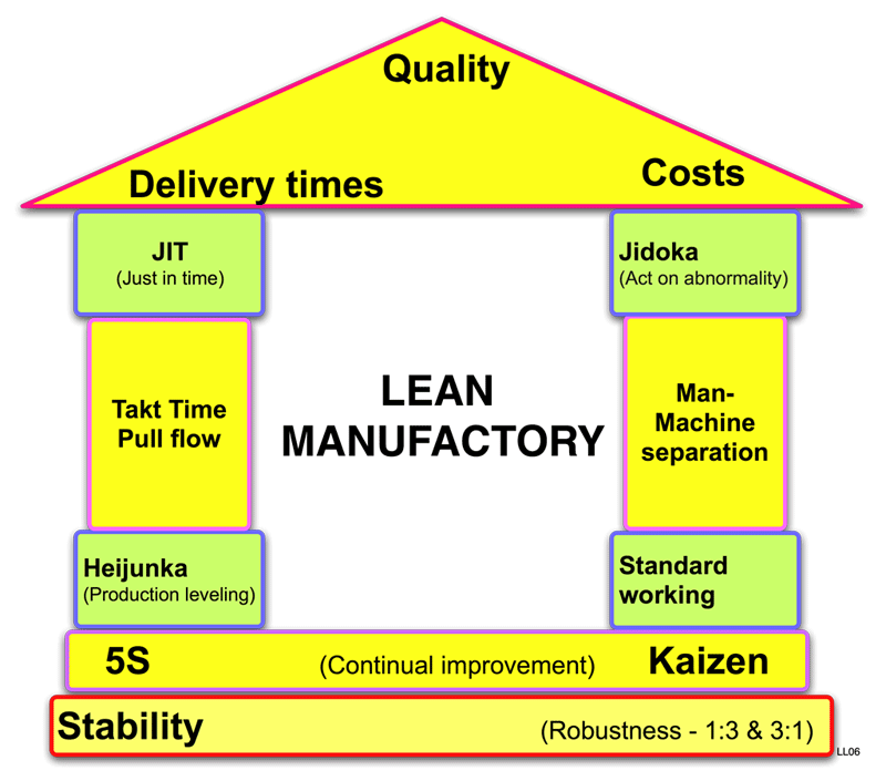 Lean manufactory house. Visualisatie van. Laurens van Lieshout jan 2006.